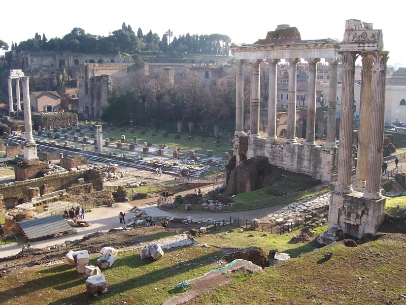 Roma - Veduta del Foro Romano